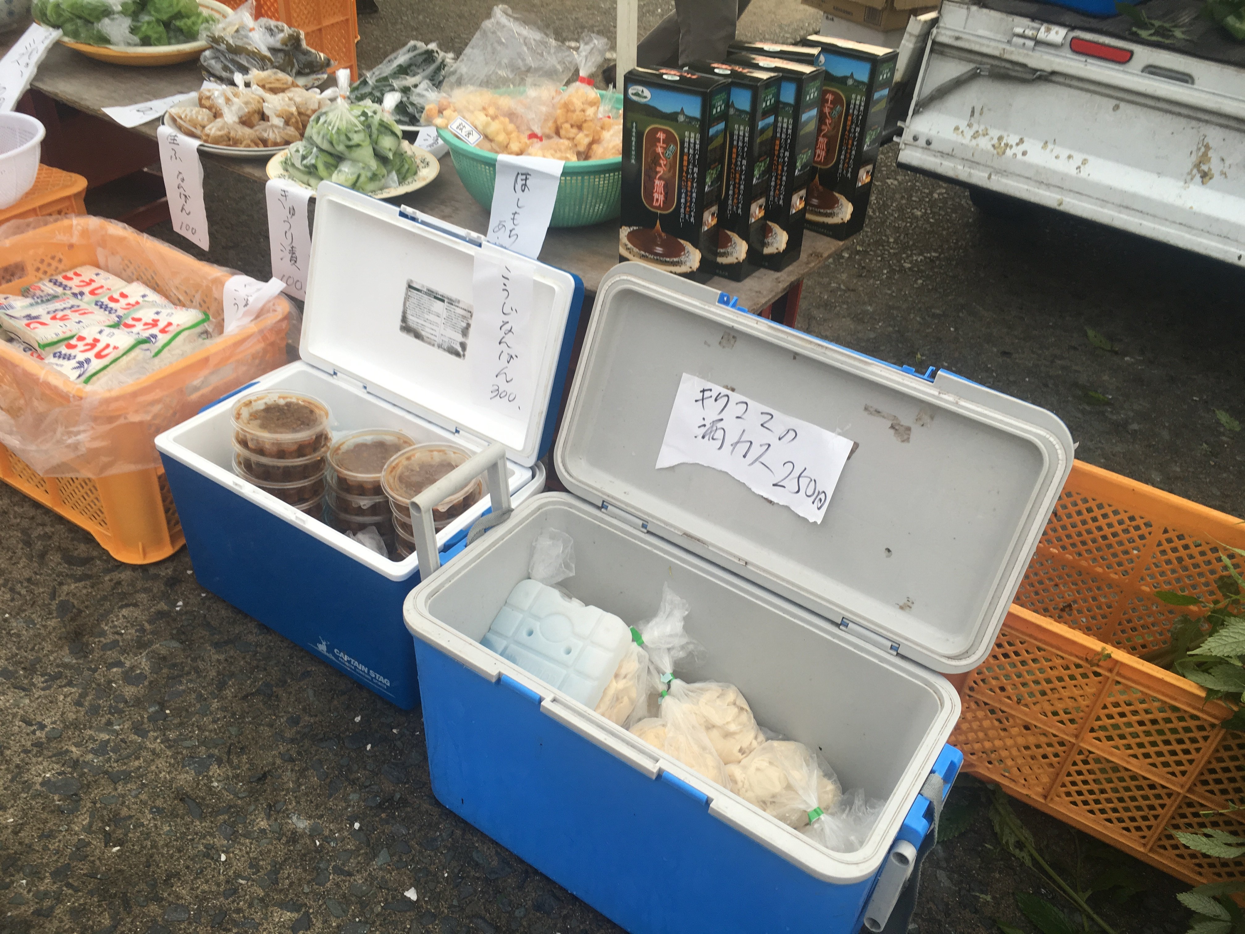 舘鼻岸壁朝市